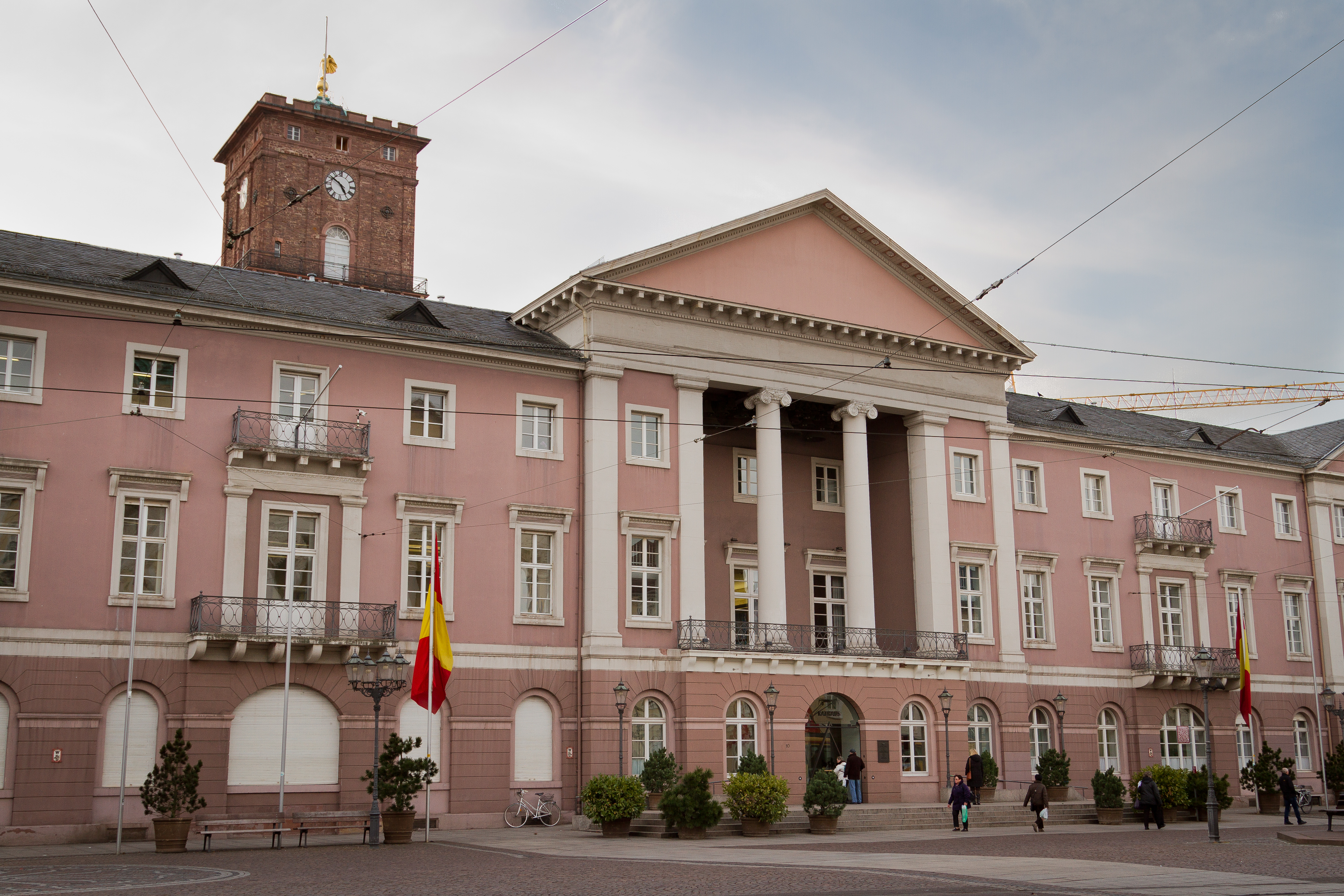 Rathaus Karlsruhe, vom Marktplatz aus gesehen